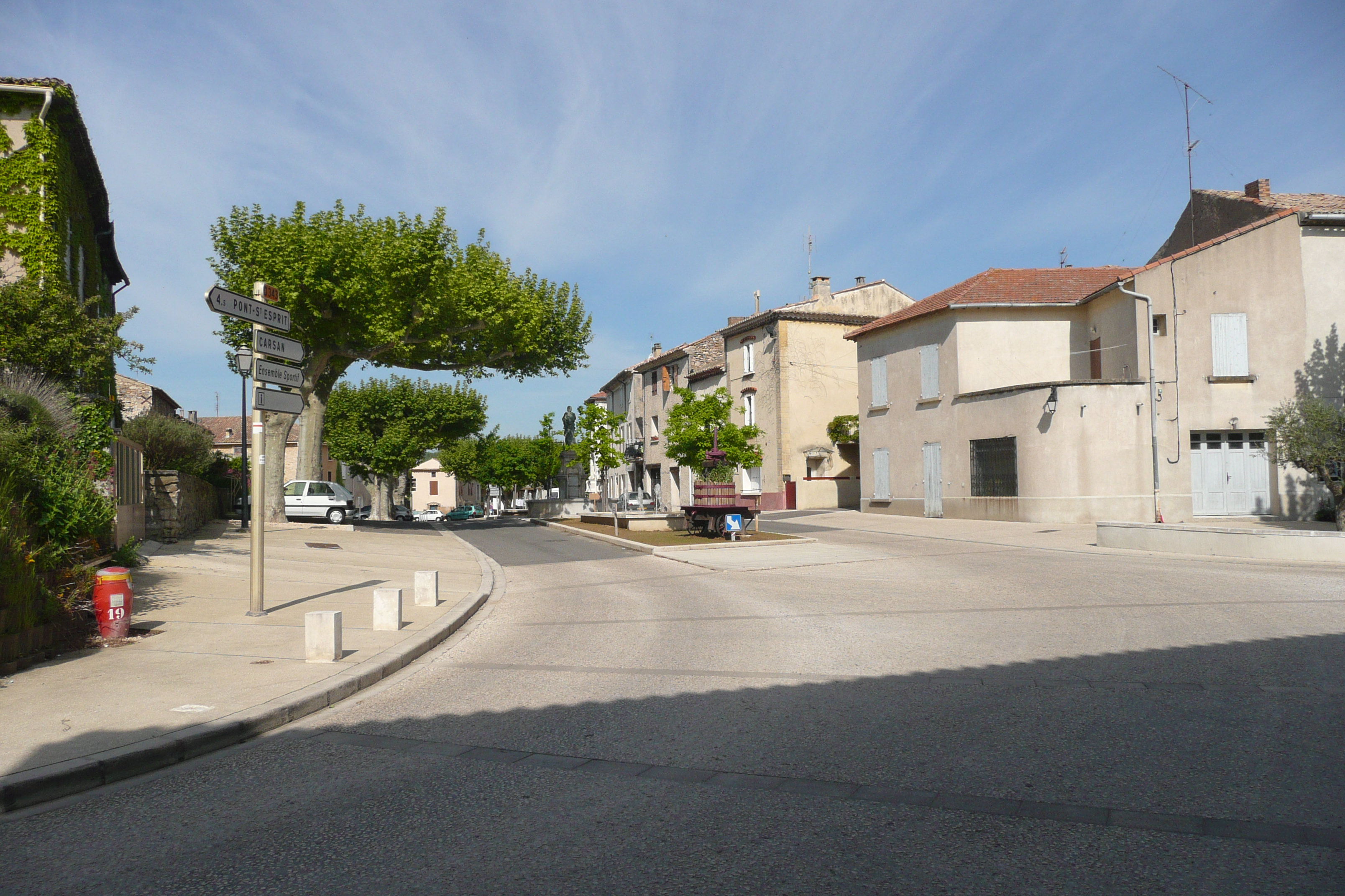 Place à Saint-Paulet-de-Caisson.